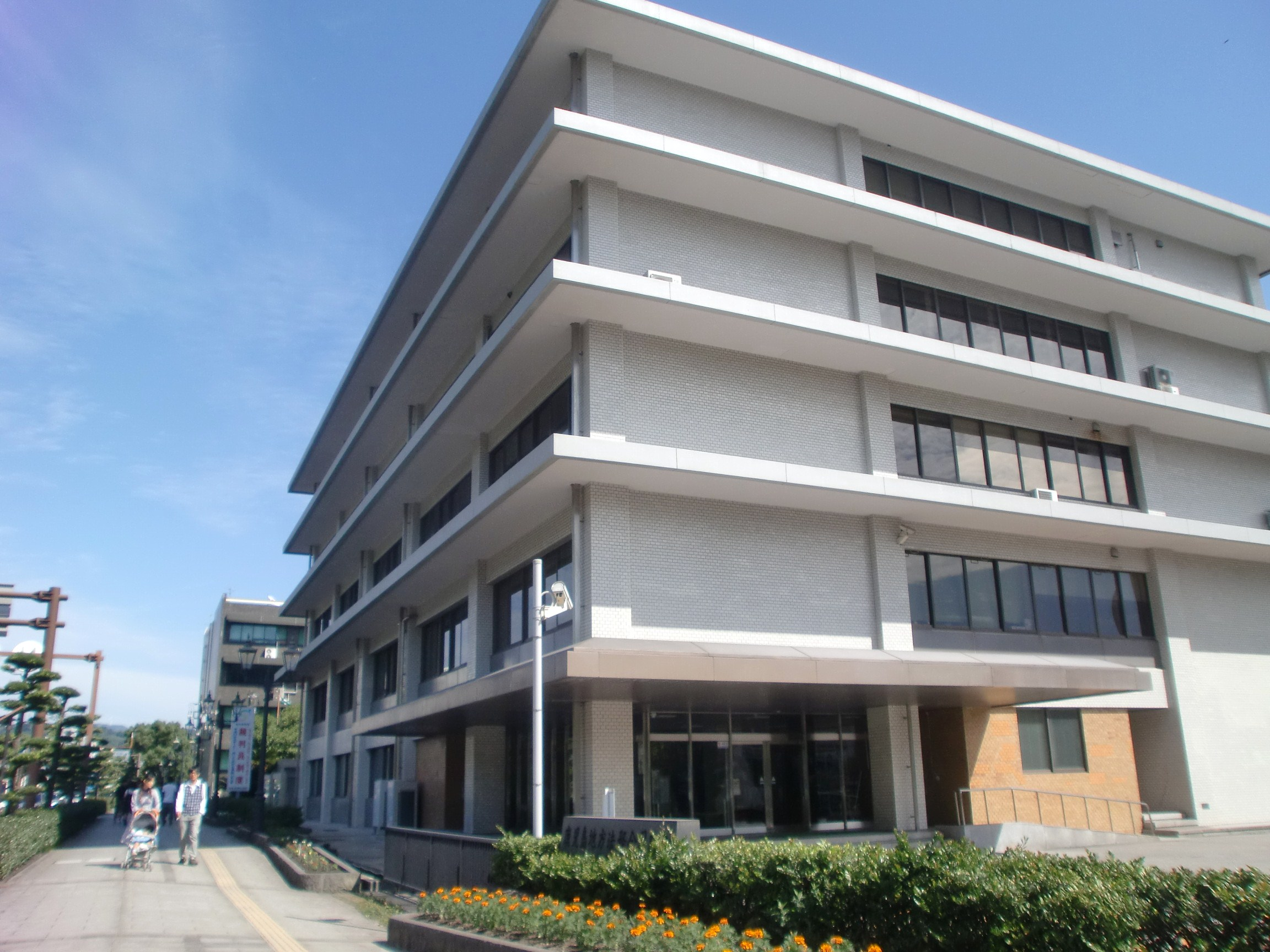 鹿児島県鹿児島市にある鹿児島地方法務合同庁舎の外観。庁内にはja:鹿児島地方検察庁及びja:鹿児島区検察庁がある。